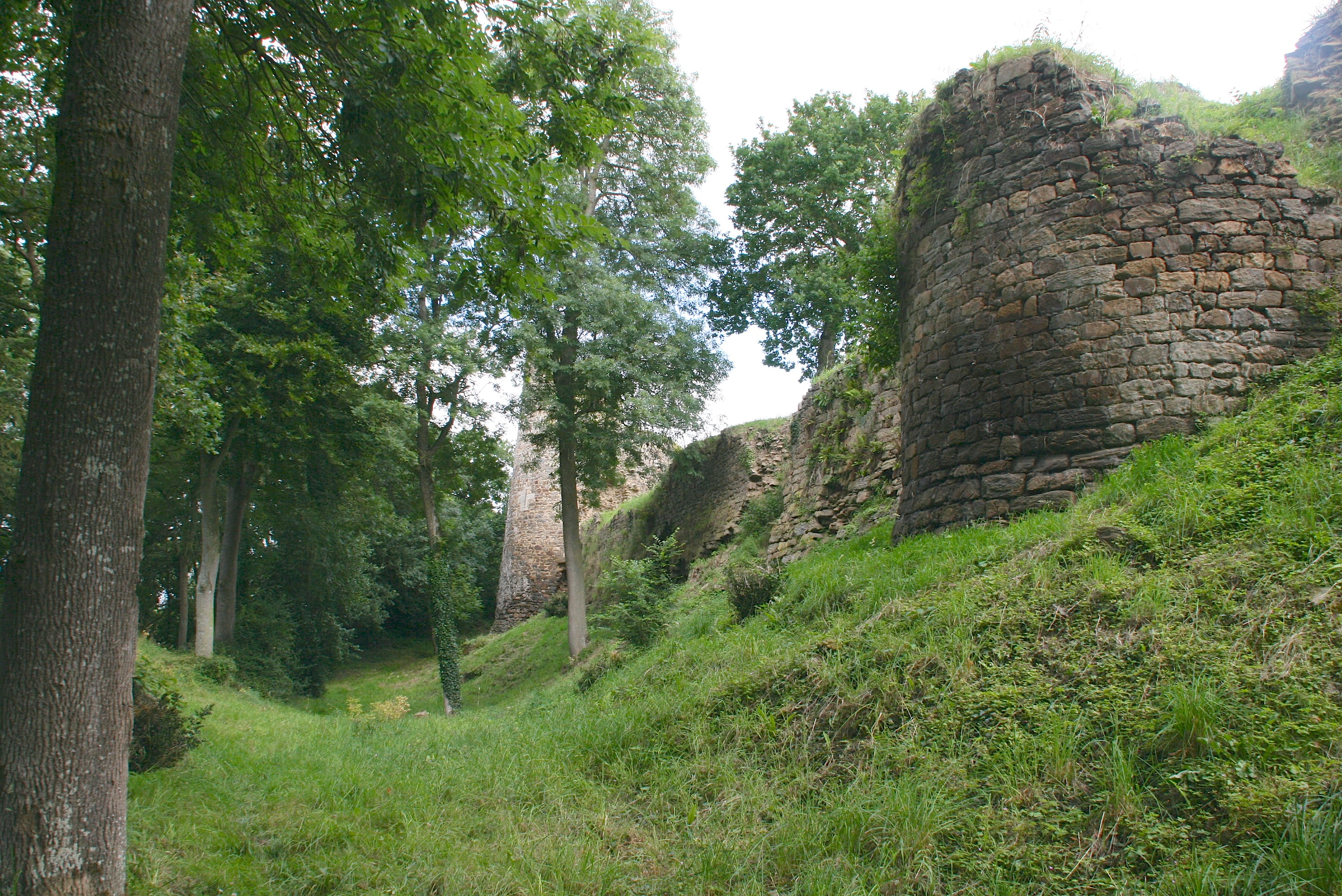 Ruines du château de Montafilan à Corseul.